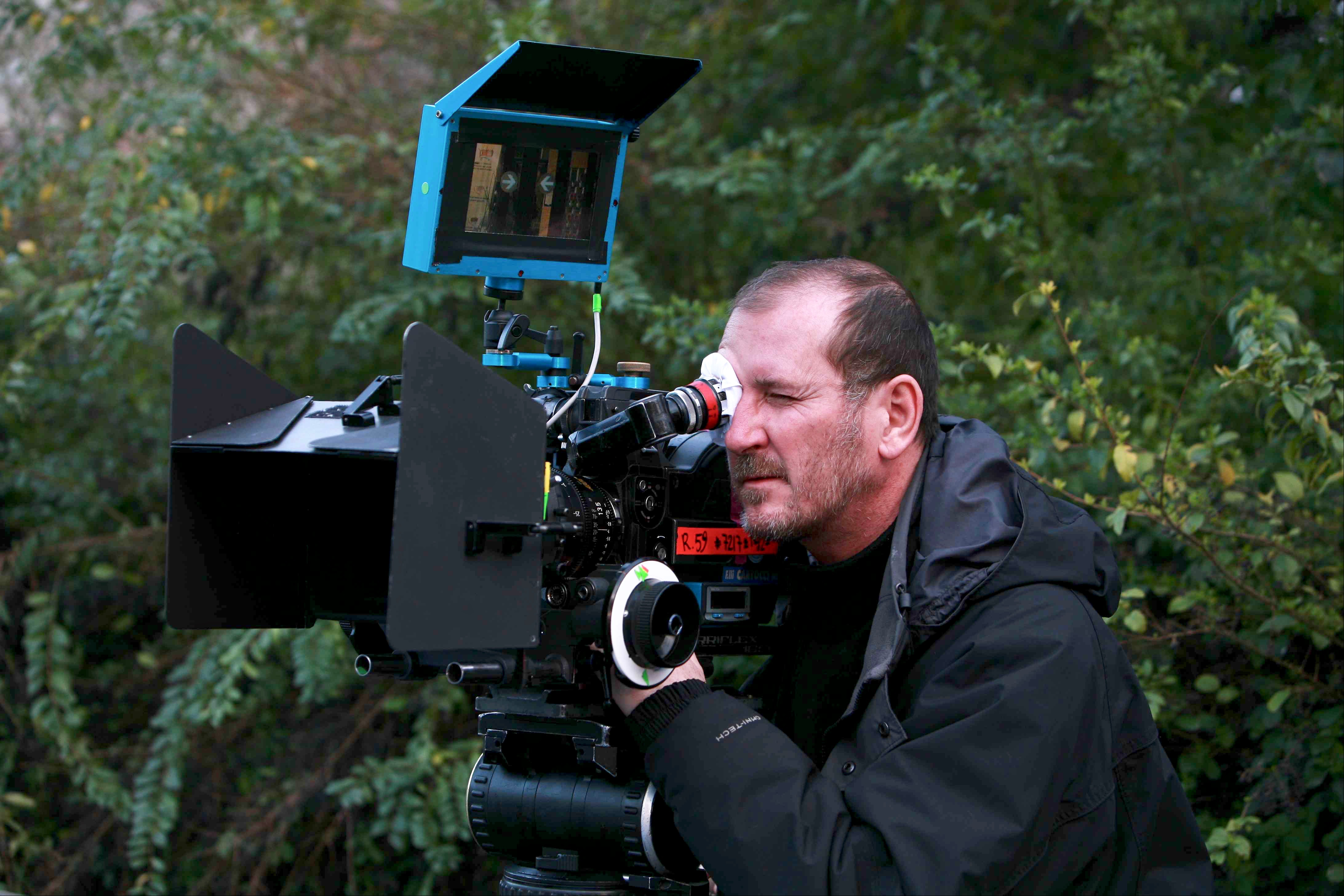 Saverio Guarna in camera sul set di Tutti pazzi per amore.